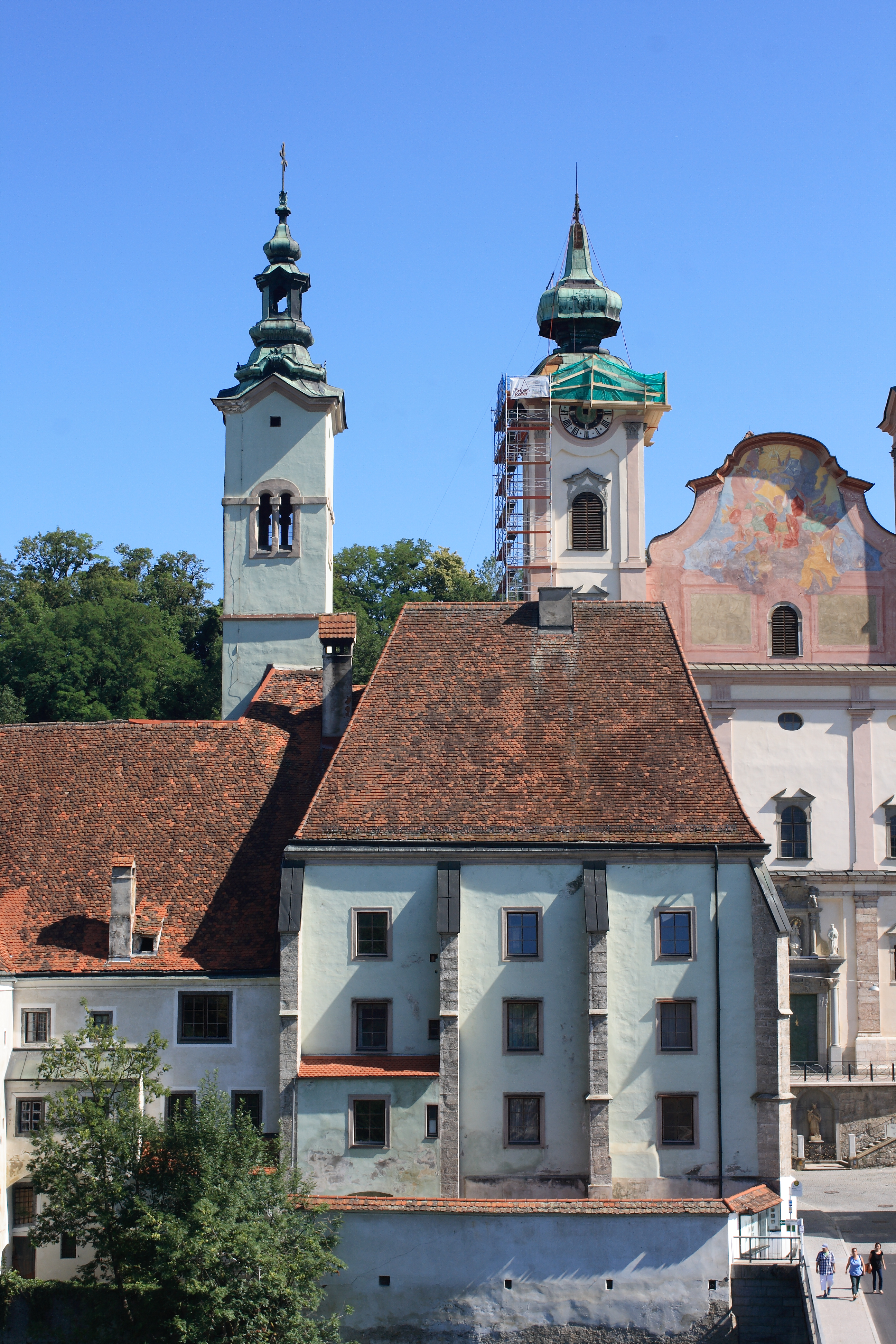 Der Vorstadtpfarrhof Steyr (ehemalige Bürgerspitalkirche) und dahinter die Michaelerkirche